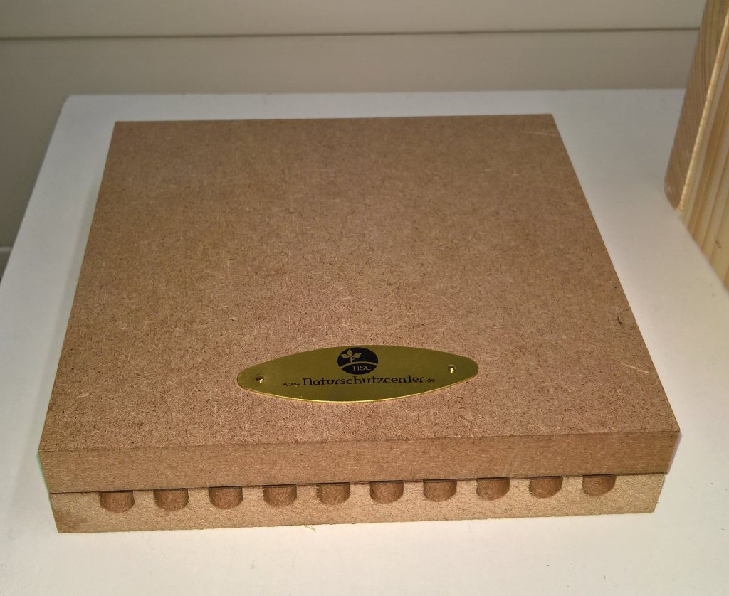 Verschiedene Insektenhotels aus dem Naturschutzcenter Stuttgart. Das Holz der Nisthilfen und Massivholz Nistblöcke sind aus nachhaltiger Süddeutscher Forstwirtschaft. Die Nisthilfen sind Handarbeit aus Werkstätte mit sozialem Hintergrund in Deutschland.